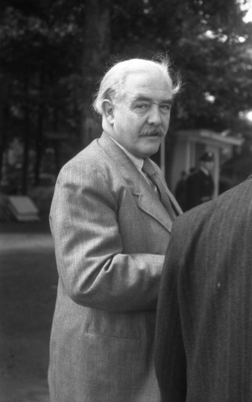 Ministerpräsidenten-Konferenz der Länder der 3 Westzonen Deutschlands auf dem Berghotel Rittersturz in Koblenz (Dr. Hinrich Kopf) 8.-10.7.1948